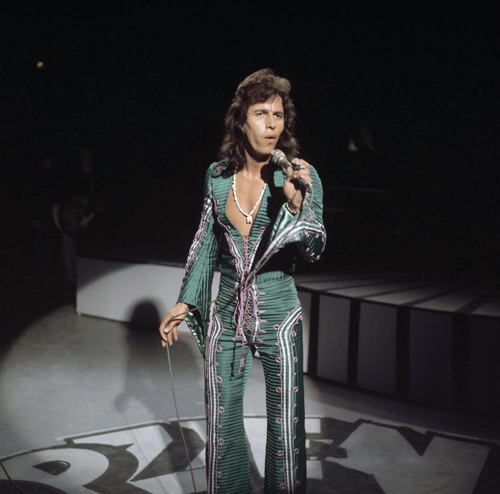 Rudy Bennett, rop/rock program 'Popzien' on Dutch television